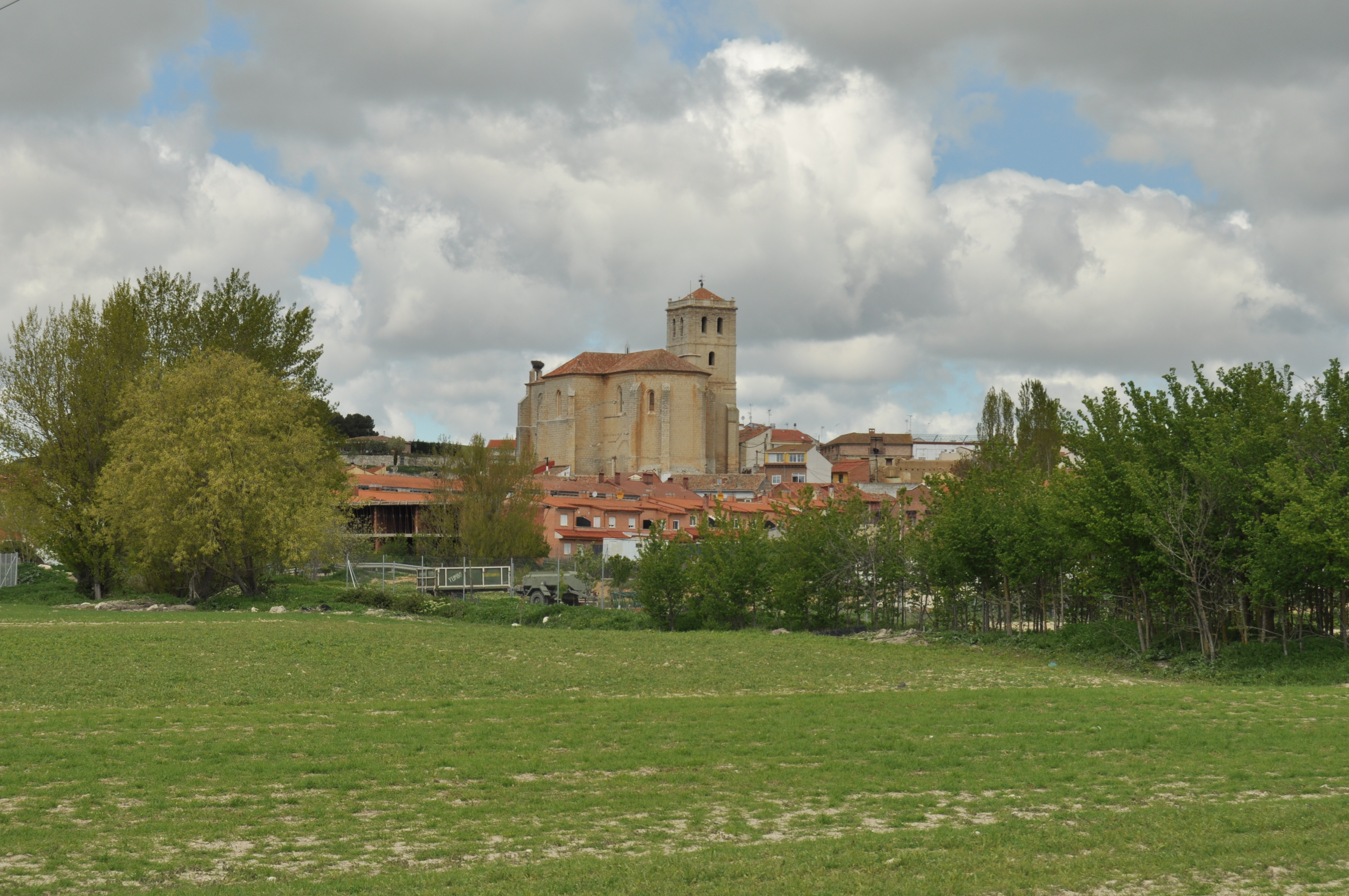 Mucientes - 001